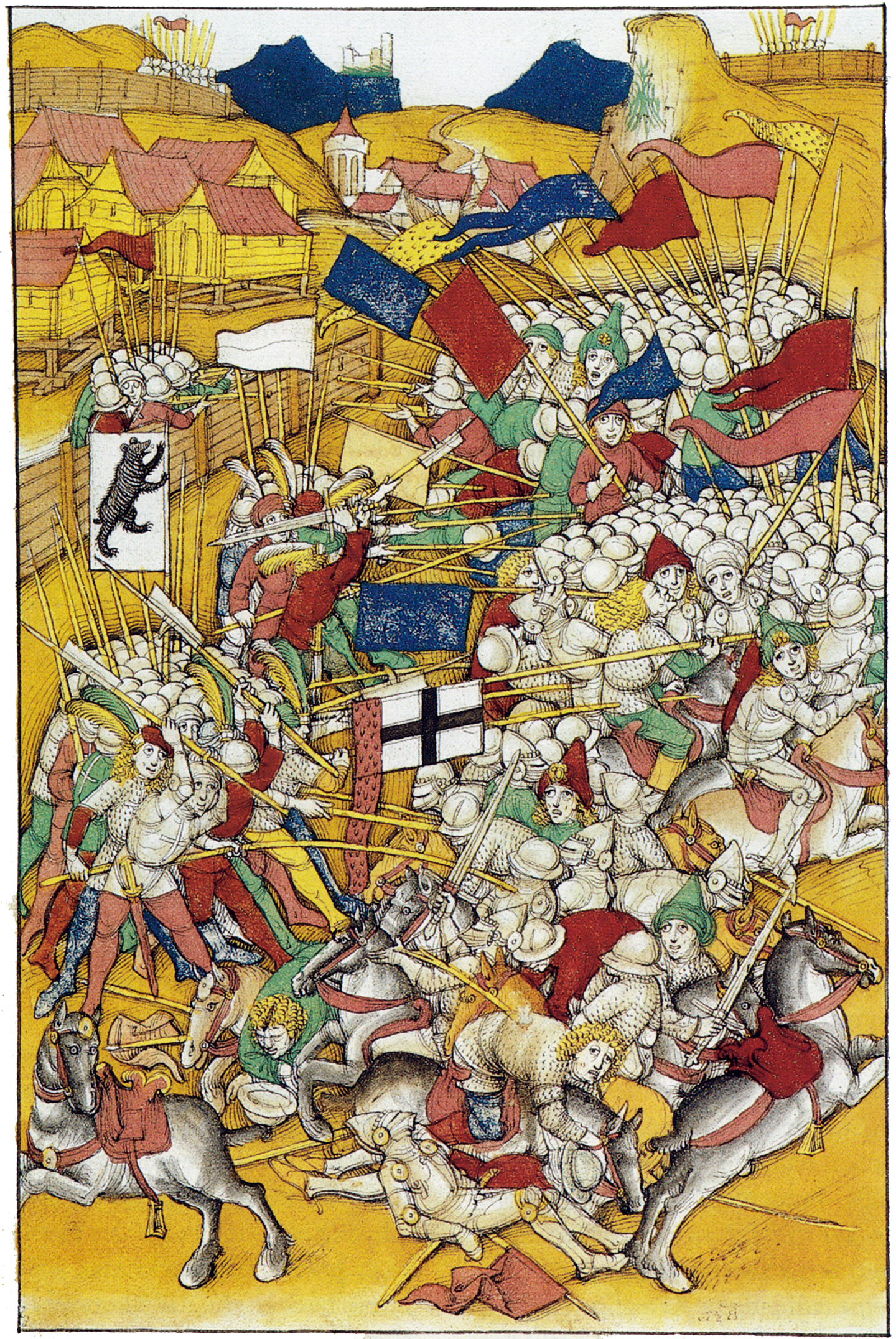 Die Schlacht bei Vögelinsegg, 15. Mai 1403 in der Spiezer Chronik des Diebold Schilling. Auf der linken Seite des Bildes die Letzi oberhalb des Hofes Loch, im Hintergrund das Dorf Speicher. Eine Gruppe Appenzeller kämpft an der Letzi, eine andere unter dem Banner mit dem Bären im Vordergrund bewaffnet mit Langspiessen gegen die Ritter des Fürstabts von St. Gallen.